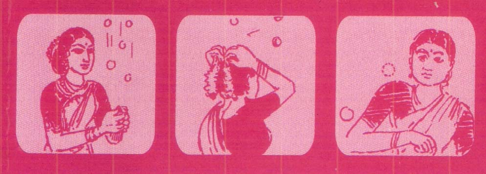 Indian Games, Jugglery, 1800 years ago, published in a book, year 2002, pazanthamizar vil'aiyaattugal பழந்தமிழர் விளையாட்டுகள் author Sengai Pothuvan, used in article